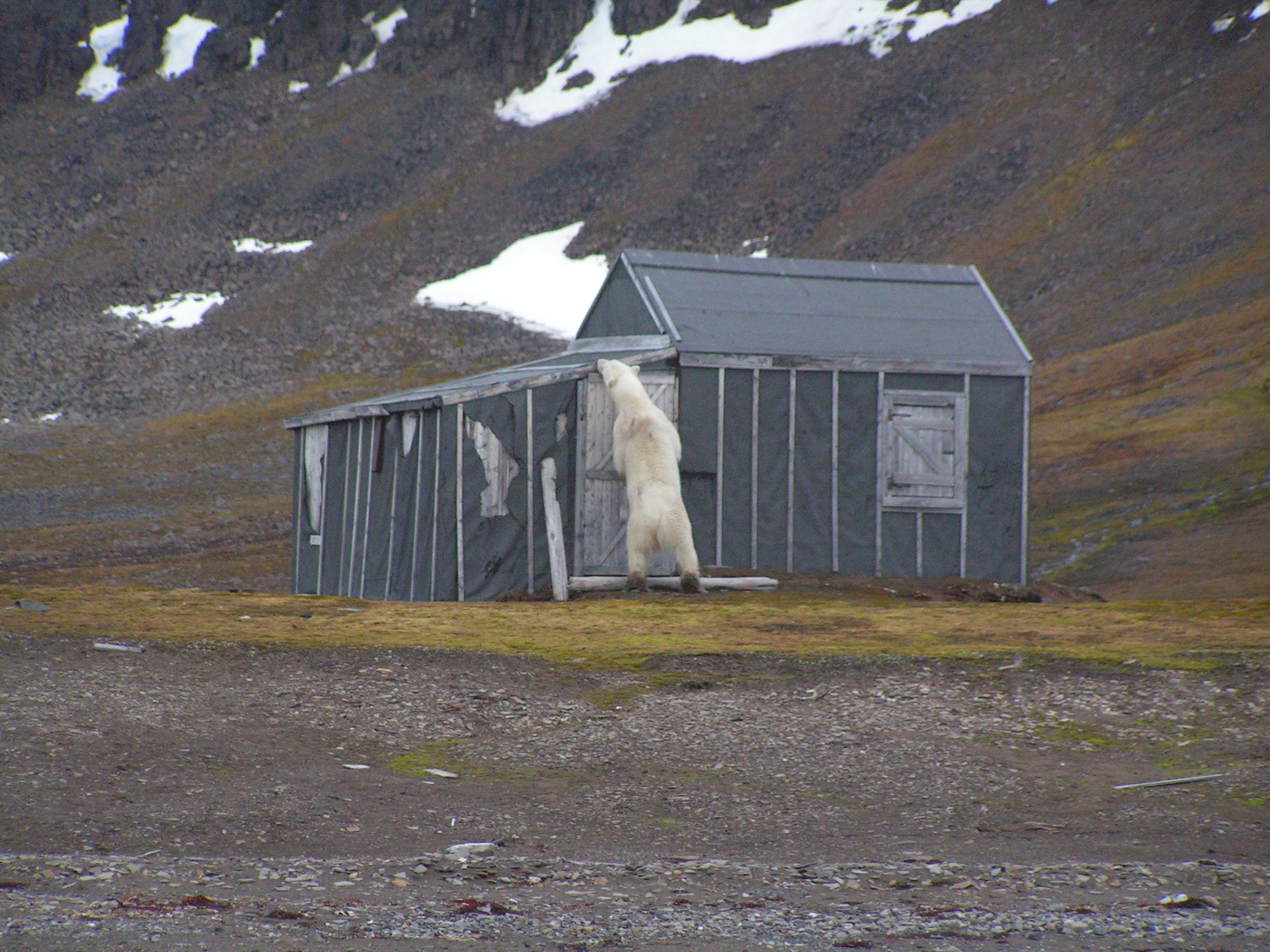 Hut on Barents island, Franken Peninsula